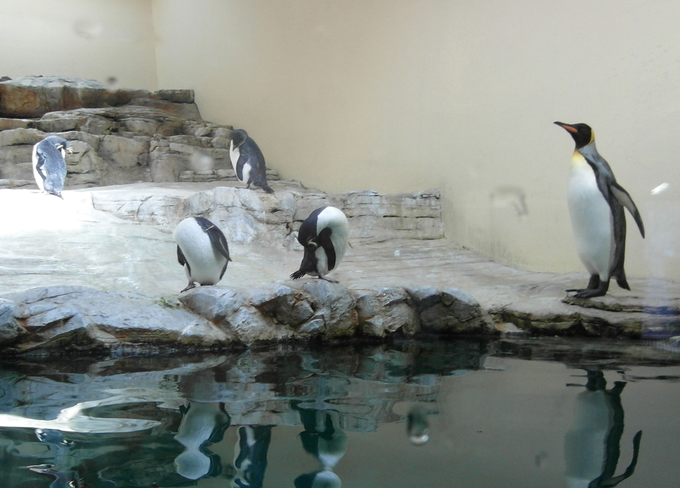 Tiergarten Schönbrunn